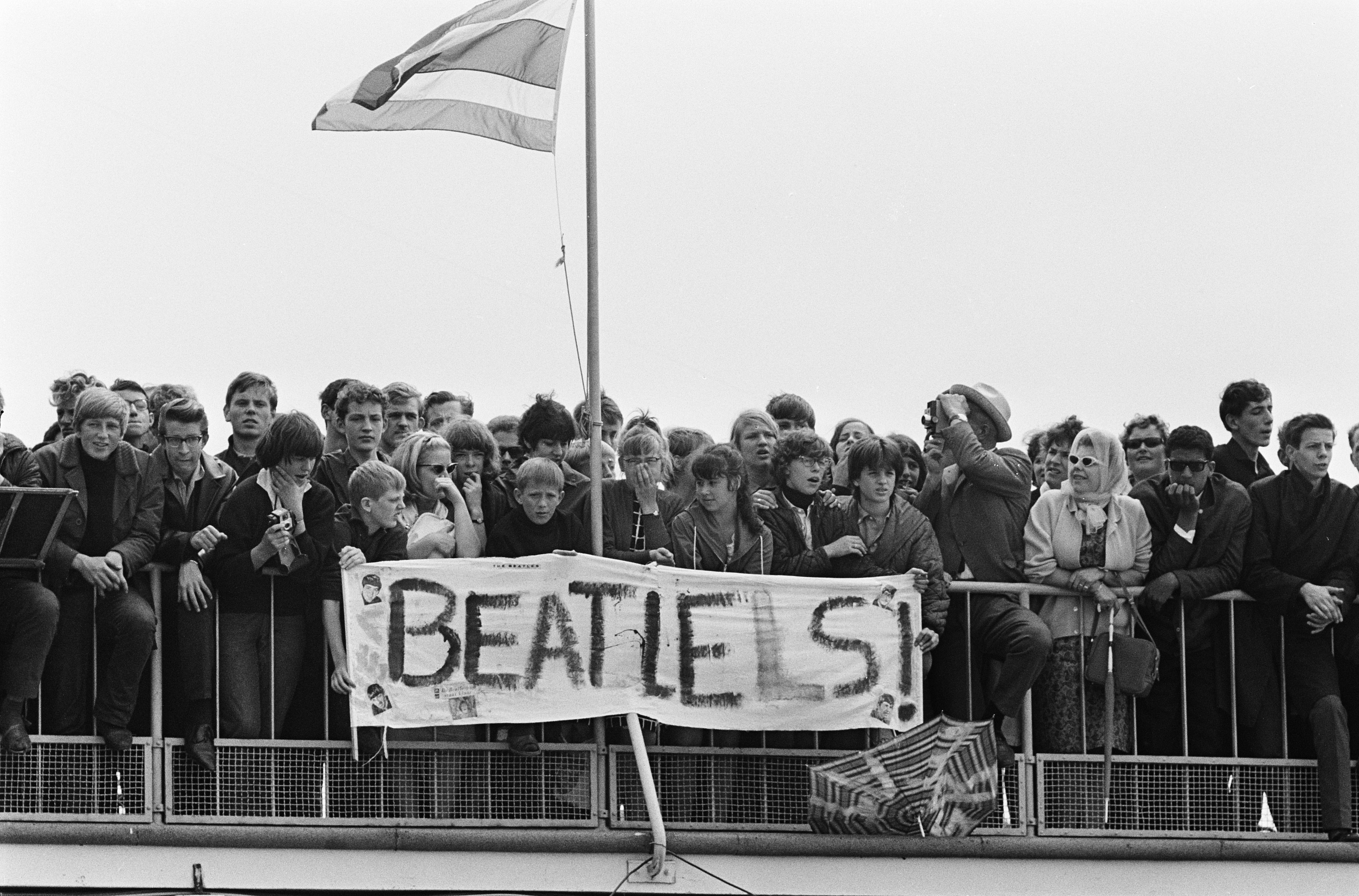 Collectie / Archief : Fotocollectie Anefo Reportage / Serie : [ onbekend ] Beschrijving : Aankomst Beatles op Schiphol, publiek met spandoek Datum : 5 juni 1964 Locatie : Noord-Holland, Schiphol Trefwoorden : popgroepen, publiek, spandoeken, vliegvelden Instellingsnaam : Beatles Fotograaf : Pot, Harry / Anefo Auteursrechthebbende : Nationaal Archief Materiaalsoort : Negatief (zwart/wit) Nummer archiefinventaris : bekijk toegang 2.24.01.05 Bestanddeelnummer : 916-5126